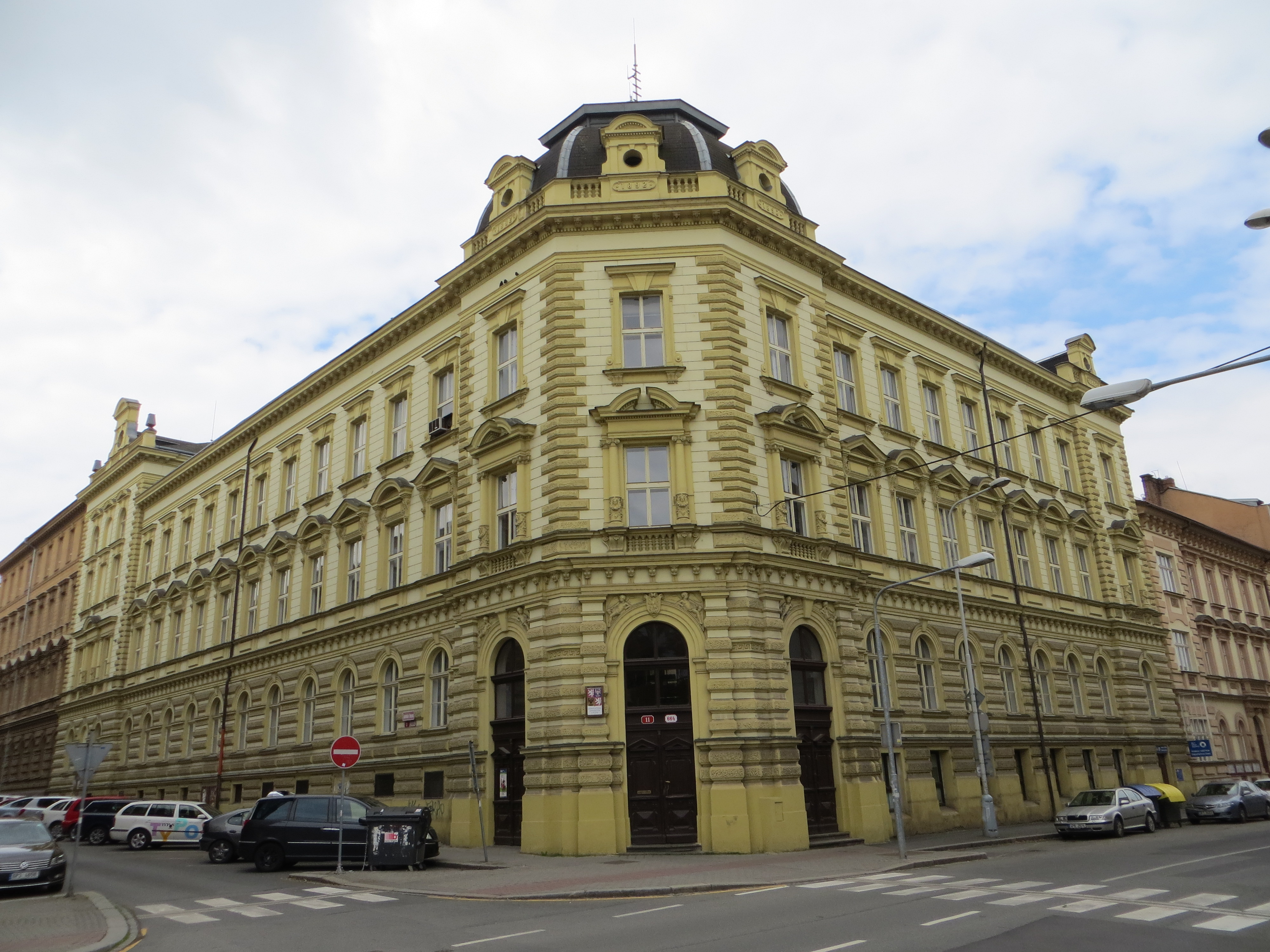 Husova